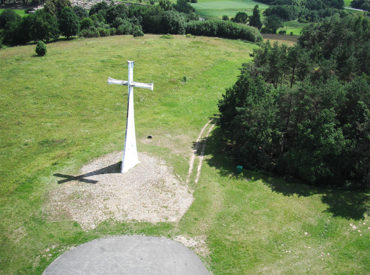 Tautos prisikėlimo kryžius - paminklas